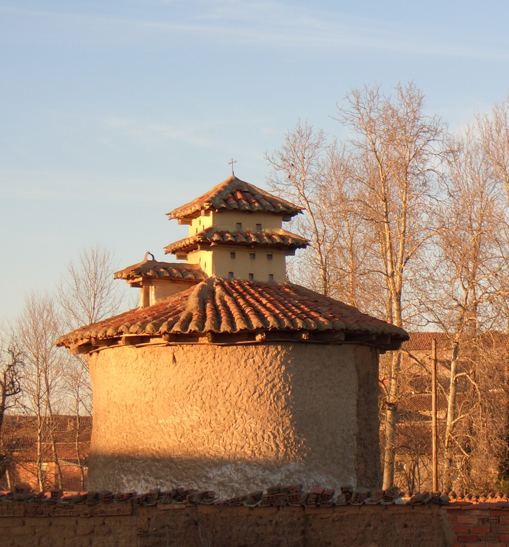 Construcción típica